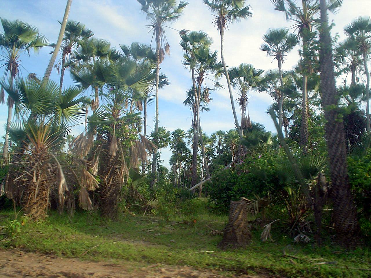 Pocinhos, BrazilCarnaubas - CE